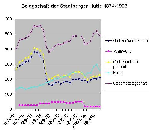 Belegschaft der Stadtberger Hütte 1874-1904 nach dem Bericht des Vorstandes der Actiengesellschaft Stadtberger Hütte für das Betriebsjahr (1874-1904)